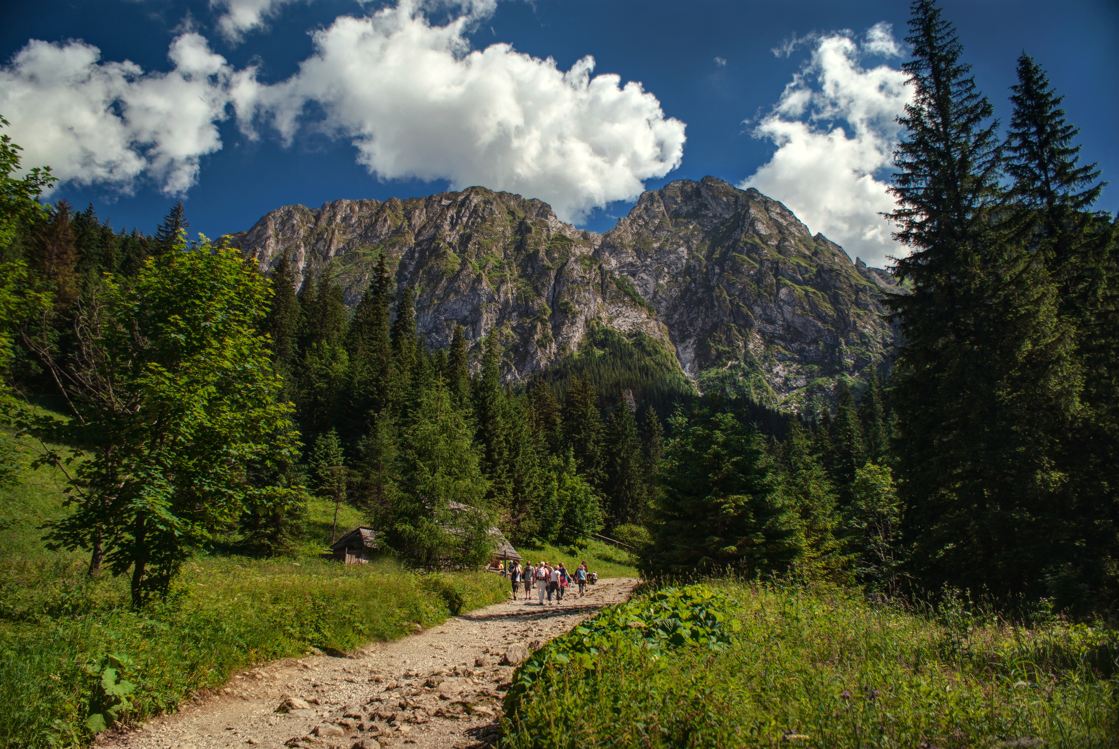 Specjalny obszar ochrony siedlisk Tatry. This is a photography of Natura 2000 protected area with ID PLC120001